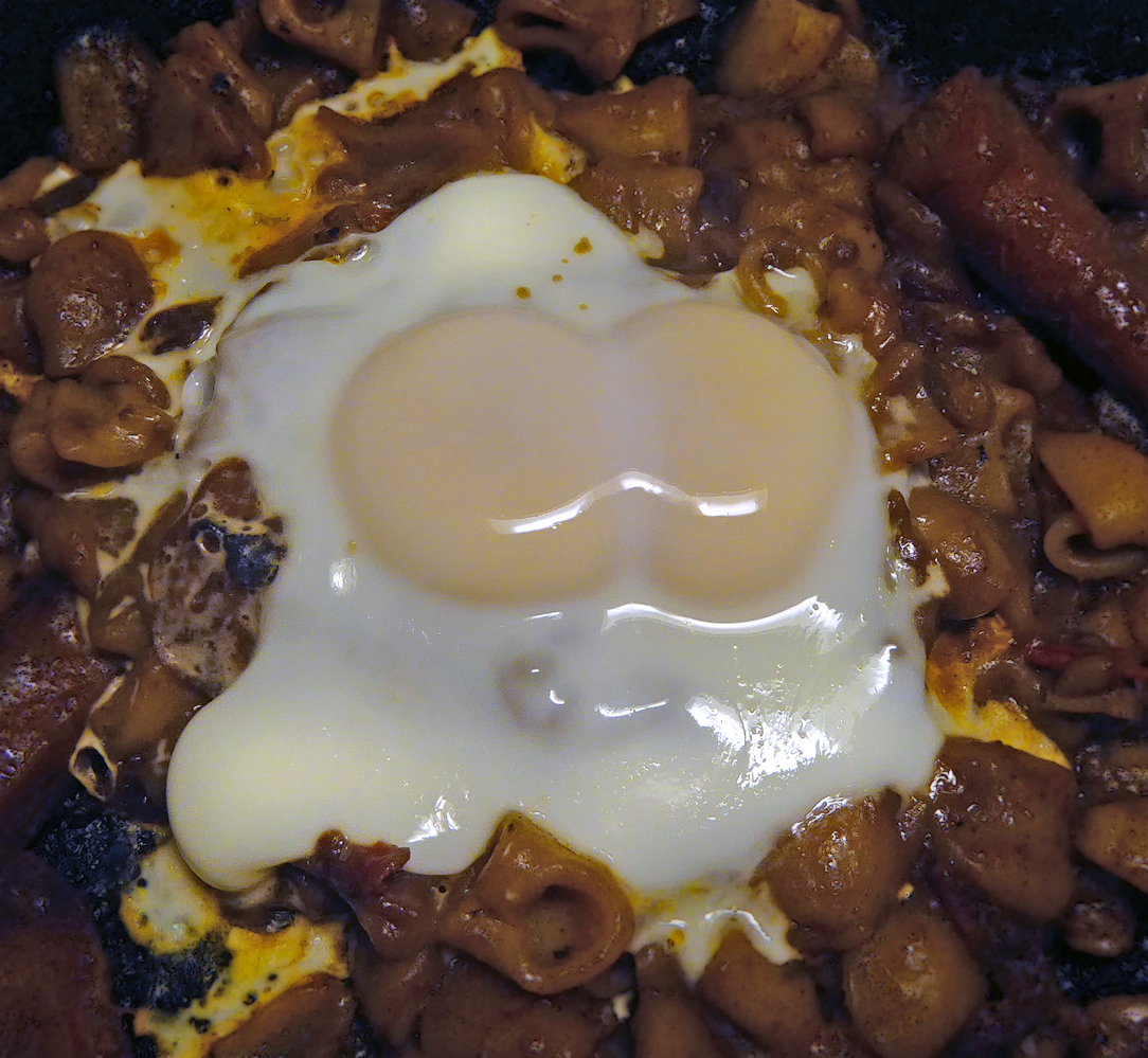 Ett ägg med två gulor.